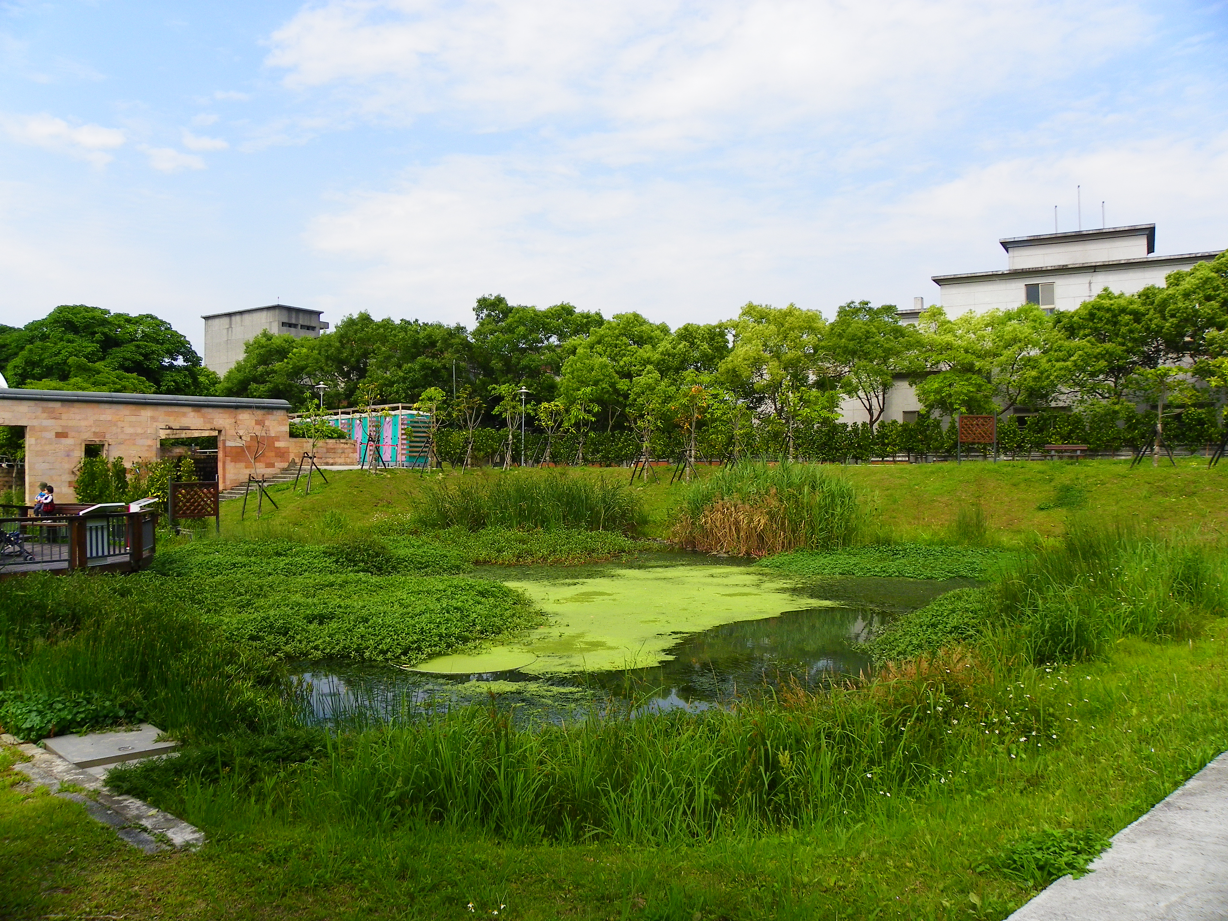 中文（台灣）: 臺北美術公園東南的溼地，攝於2010年臺北國際花卉博覽會期間。